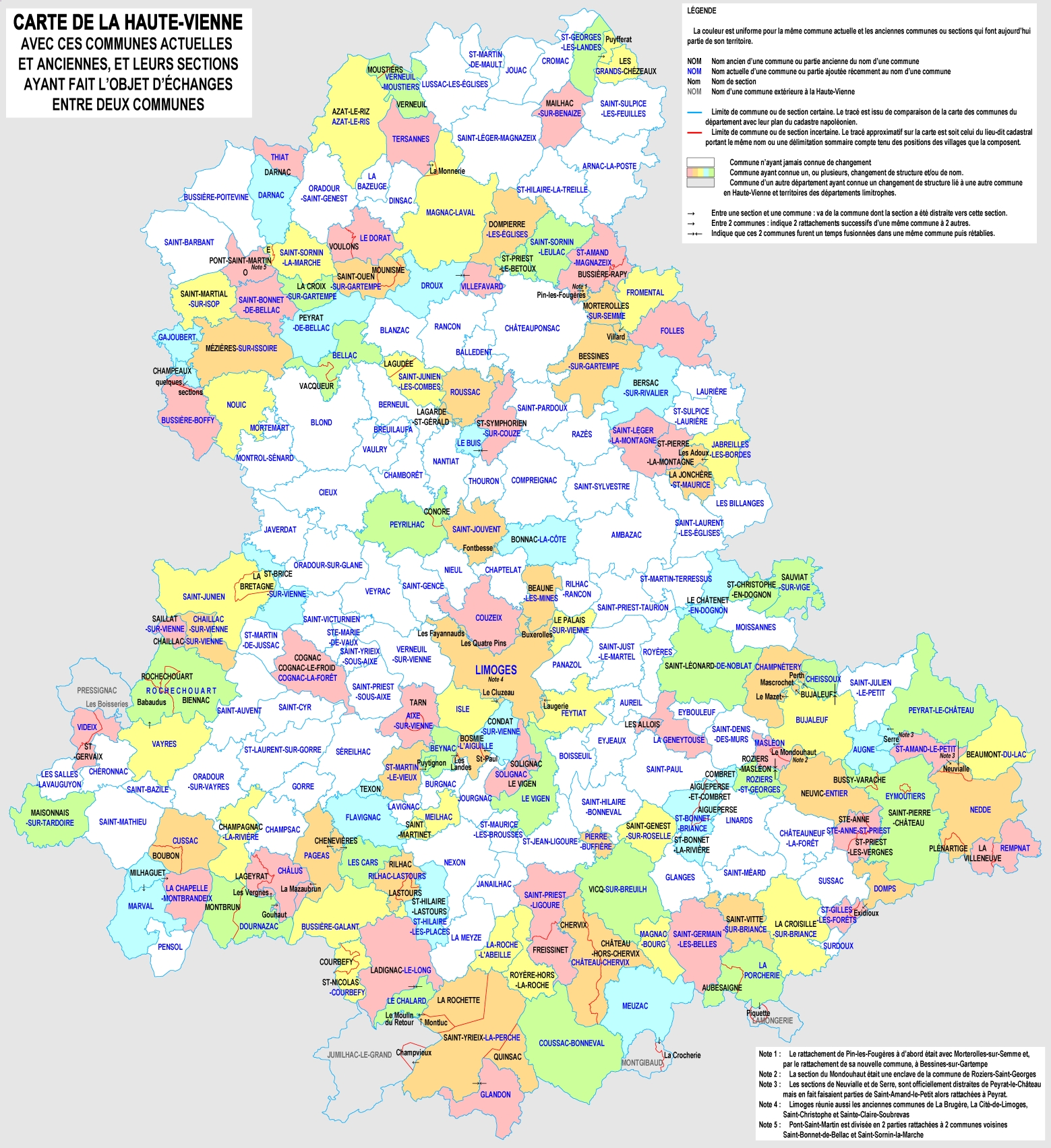 Carte des communes actuelles et anciennes, et de sections (corrigée)